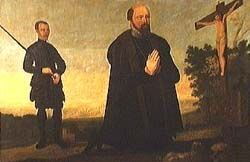 Portræt af otte Krumpen.